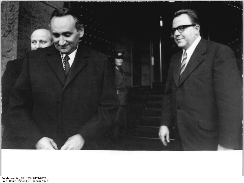 ADN-ZB Koard 21.1.72-Sue-Berlin: Verhandlungen Kohl-Bahr Am 20.1.1972 trafen der Staatssekretär, beim Ministerrat der DDR, Dr. Michael Kohl (r), und der Staatssekretär im Bundeskanzleramt der BRD, Egon Bahr (l), in Begleitung ihrer Delegationen zusammen. Die Verhandlungen über einen Verkehrsvertrag zwischen der DDR und der BRD fanden im Haus des Ministerrates in der DDR-Hauptstadt statt. - Hier nach der Verabschiedung von Herrn Bahr durch Dr. Kohl. Die Verhandlungen wurden am 21.1.1972 am gleichen Ort wie o. genannt weitergeführt.